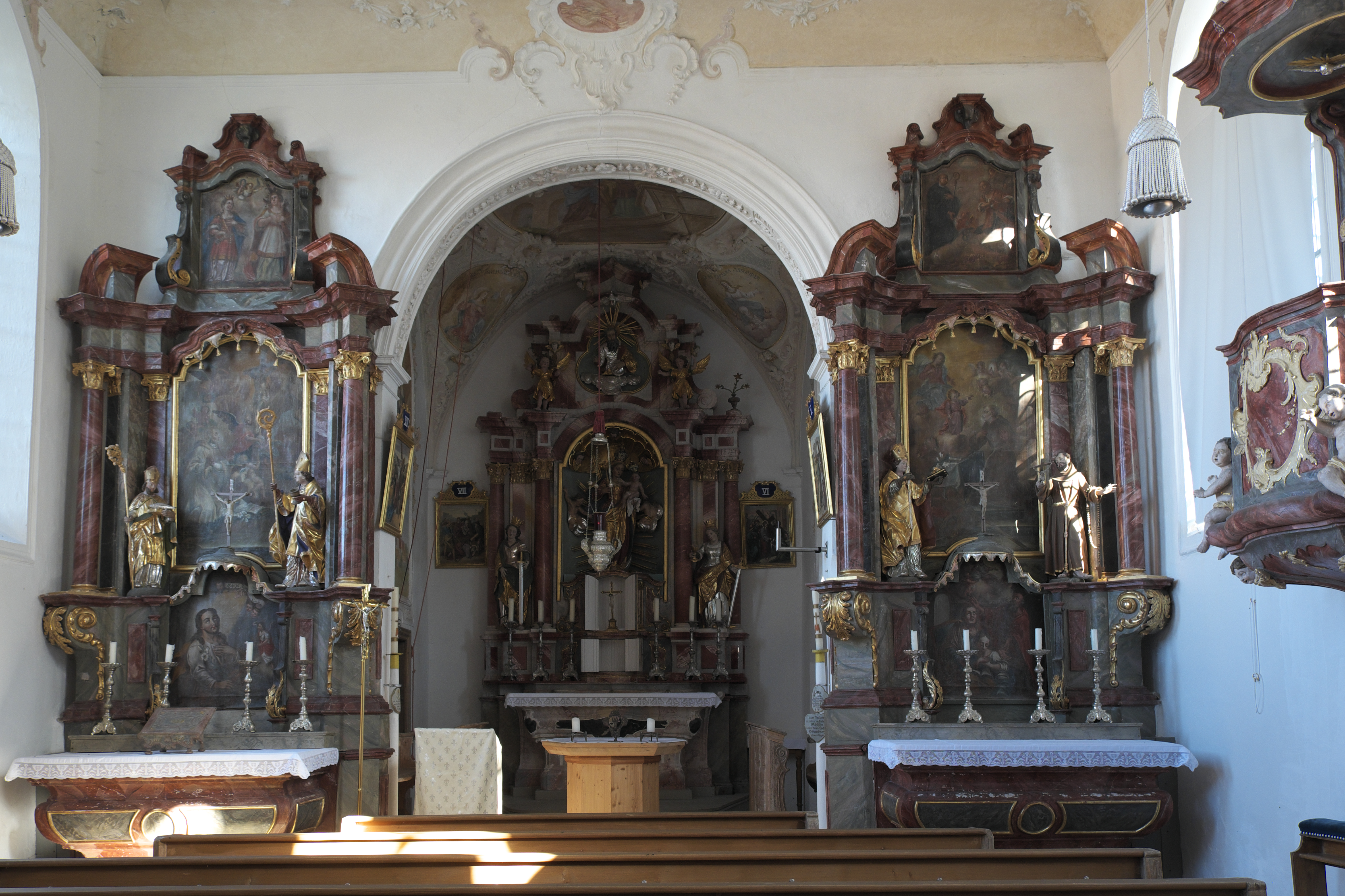 Katholische Filialkirche Unsere Liebe Frau in Petzenhausen, einem Ortsteil von Weil (Oberbayern) im Landkreis Landsberg am Lech (Bayern/Deutschland), Innenraum, Haupt- und Seitenaltäre